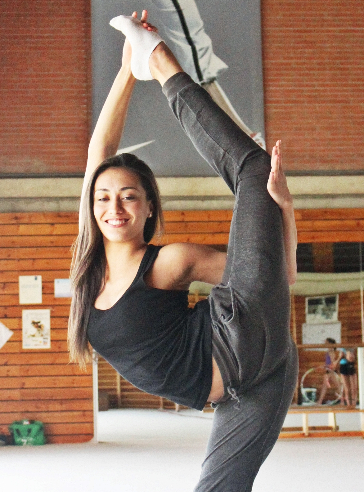 La gimnasta española Natalia García Timofeeva en el CAR de San Cugat en 2013.